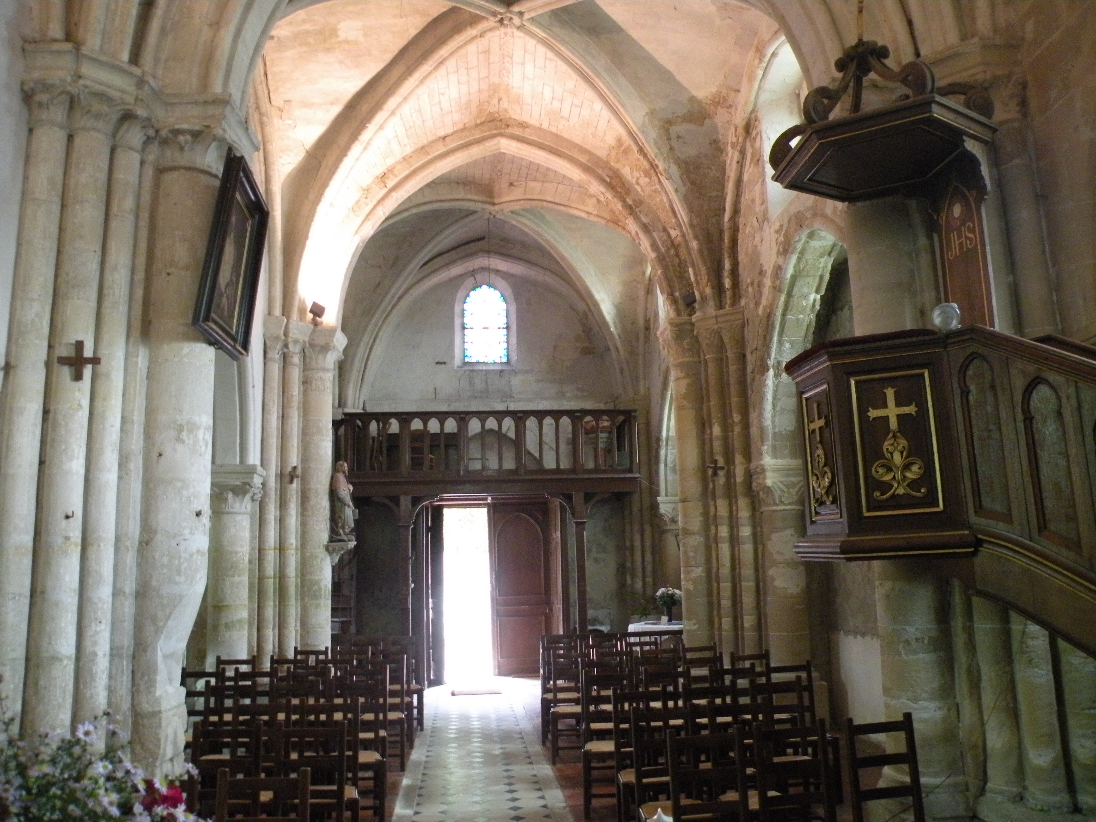 Intérieur de l'église Saint-Martin de Vallangoujard